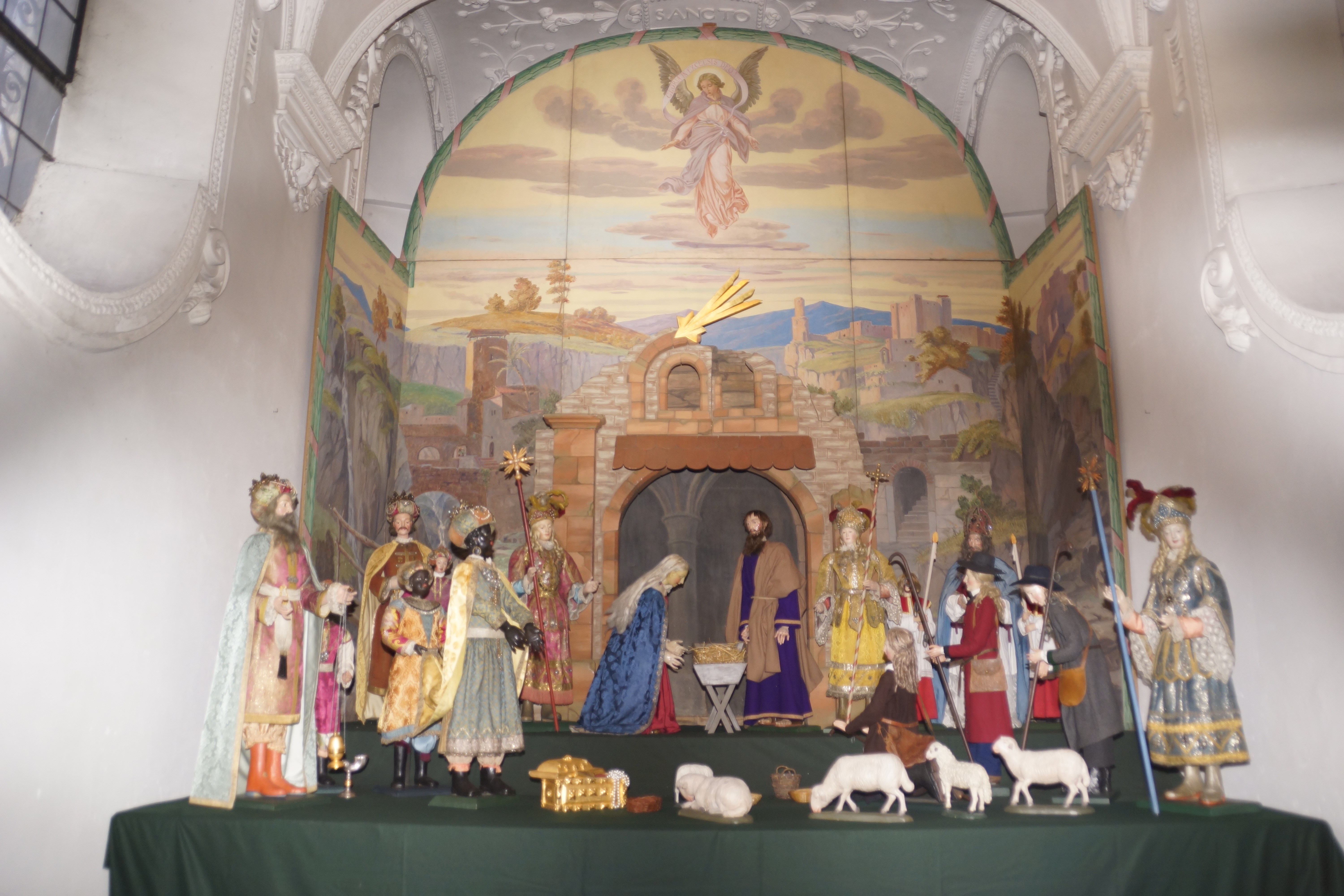 Barocke Weihnachtskrippe der Marianischen Kongregation mit bekleideten Figuren aus dem 17. Jahrhundert aufgestellt. Sie ist eine der ältesten Krippen Tirols. Das Hintergrundbild wurde im Jahre 1938 vom Haller Kunstmaler Franz-Xaver Fuchs die ganze Raumhöhe umfassend in Öl auf Leinwand gemalt. Die Krippenfiguren wurden in den Jahren 1989 bis 1993 in Zusammenarbeit mit dem Österreichischen Bundesdenkmalamt vollständig restauriert.